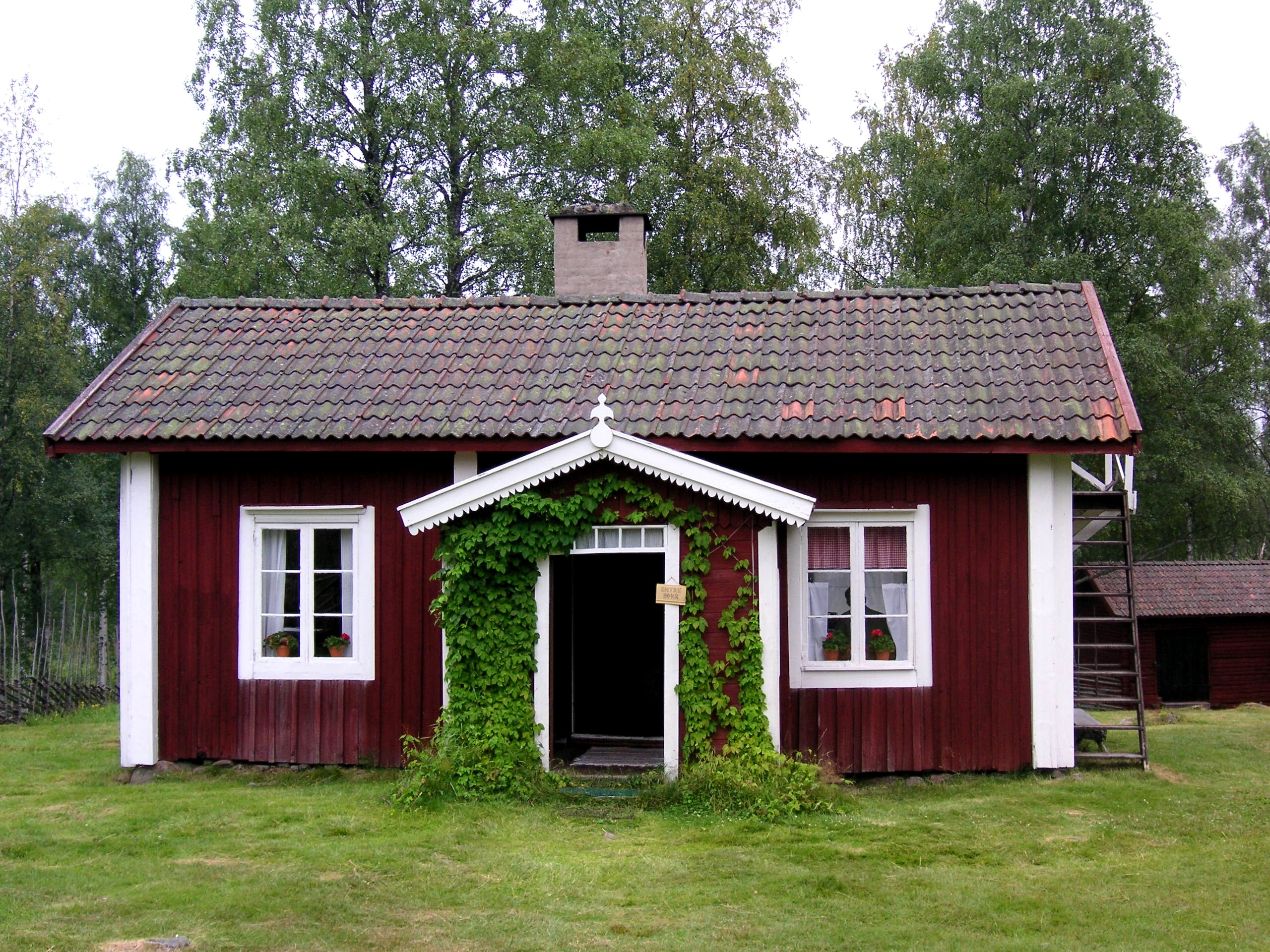 Dan Andersson torp i Finnmarken